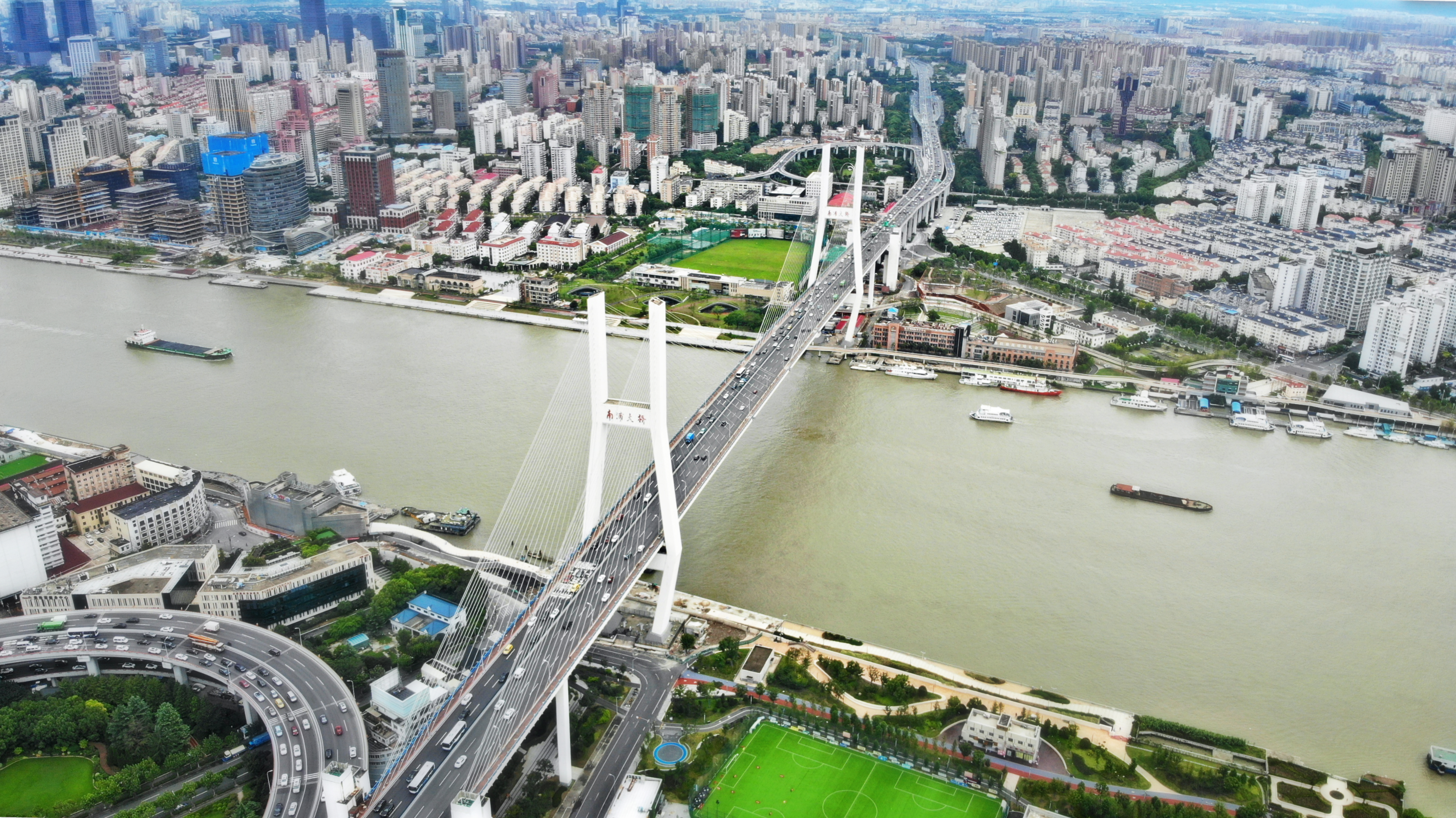 中文（中国大陆）: 上海南浦大桥 2018.9